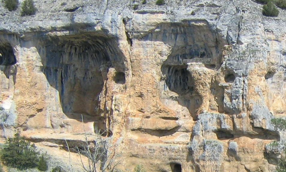 Detalle de una imagen correspondiente al Cañón del río Lobos (provincia de Soria, España) obtenida en Commons